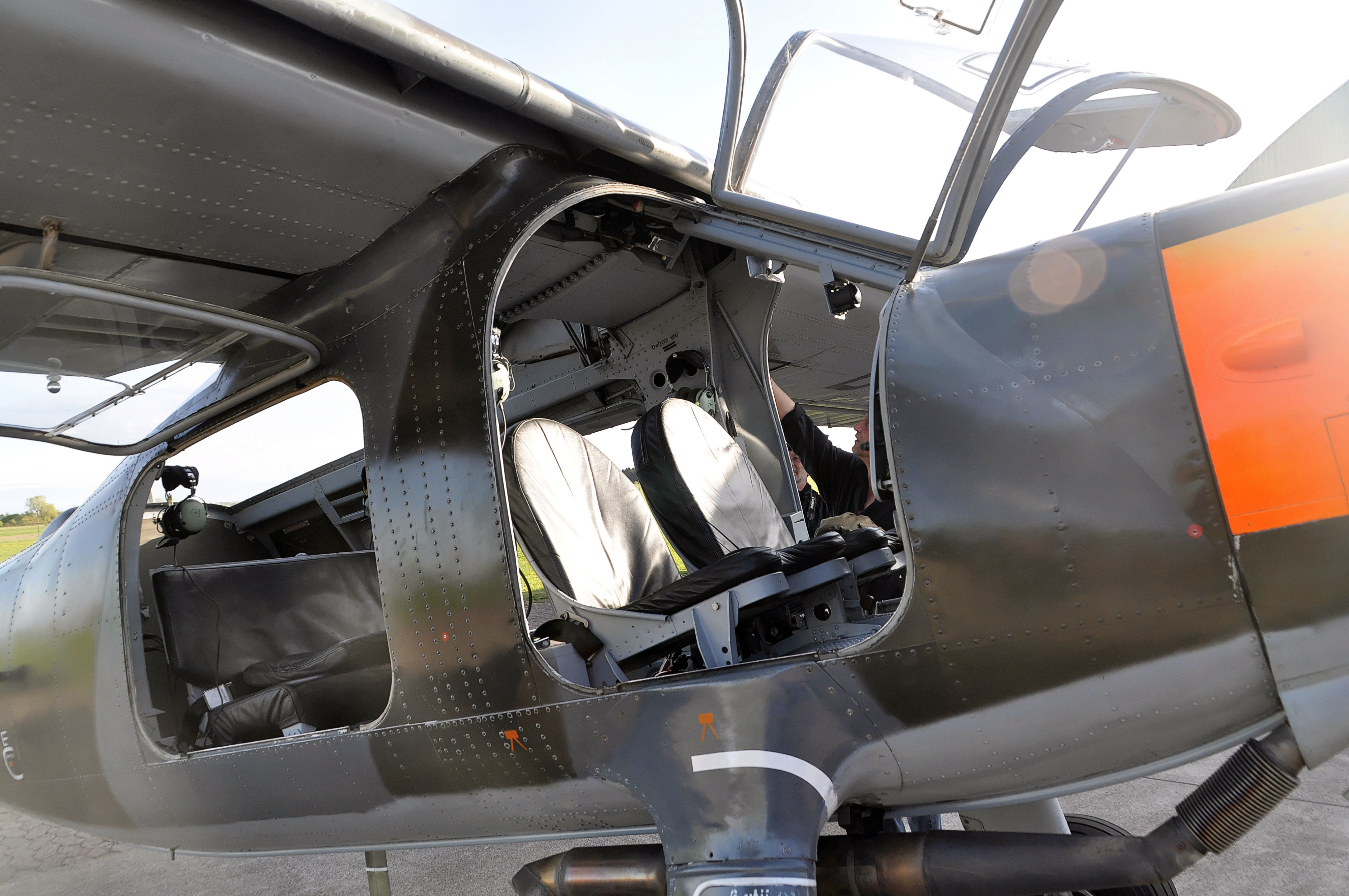 Luftbilder von der Nordseeküste 2012-05